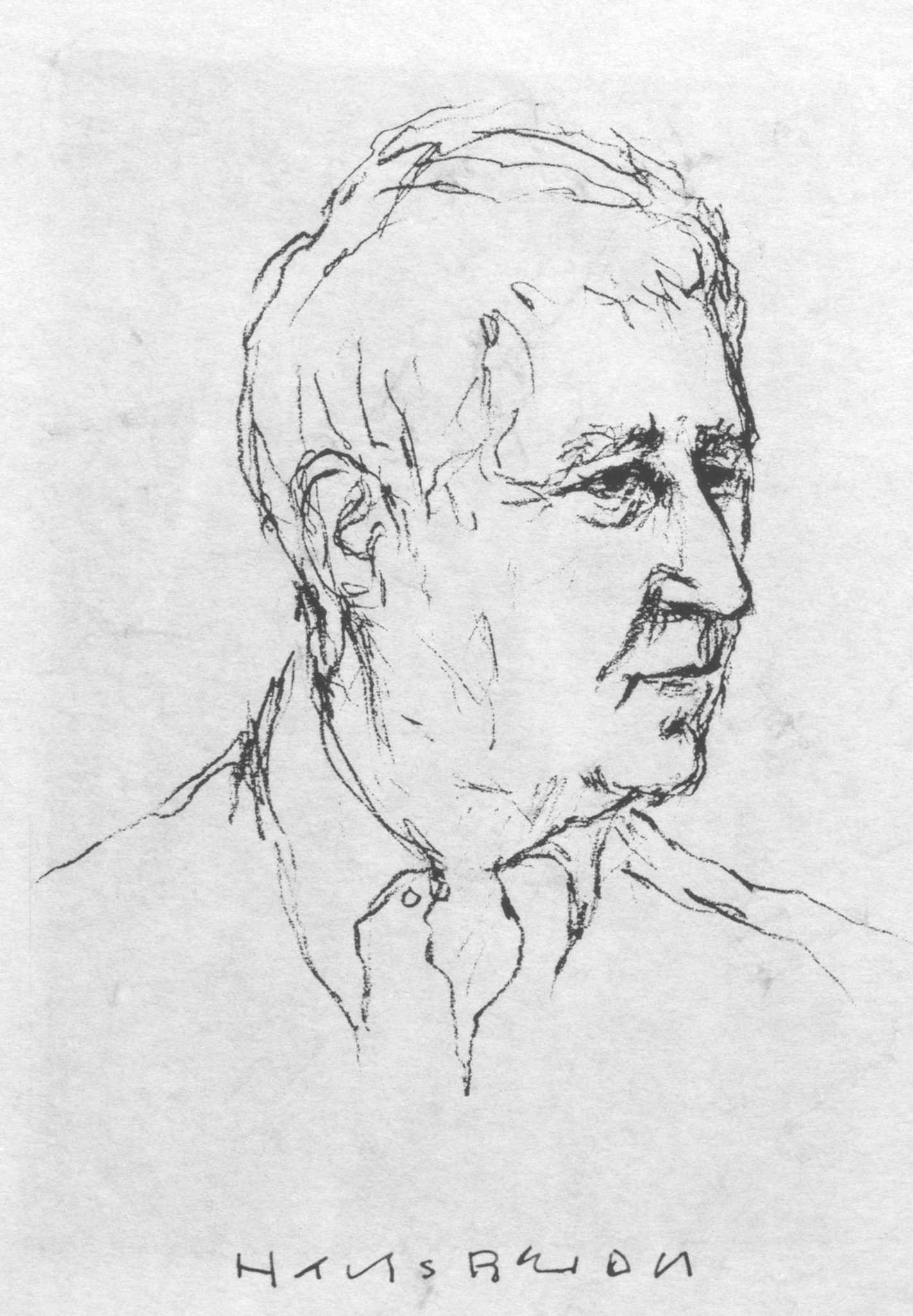 Hans Bender, Porträtzeichnung von Eva Zippel.